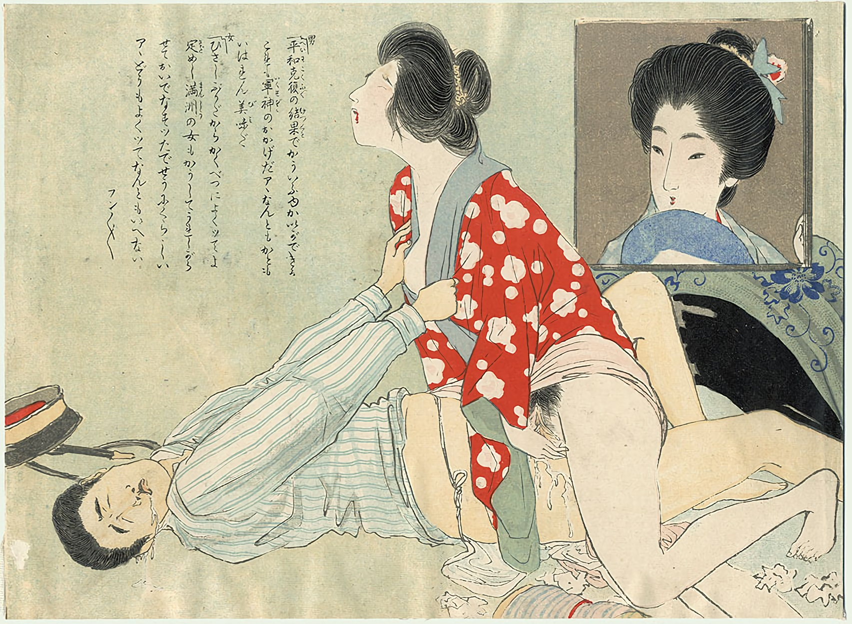 Shunga del período Meiji